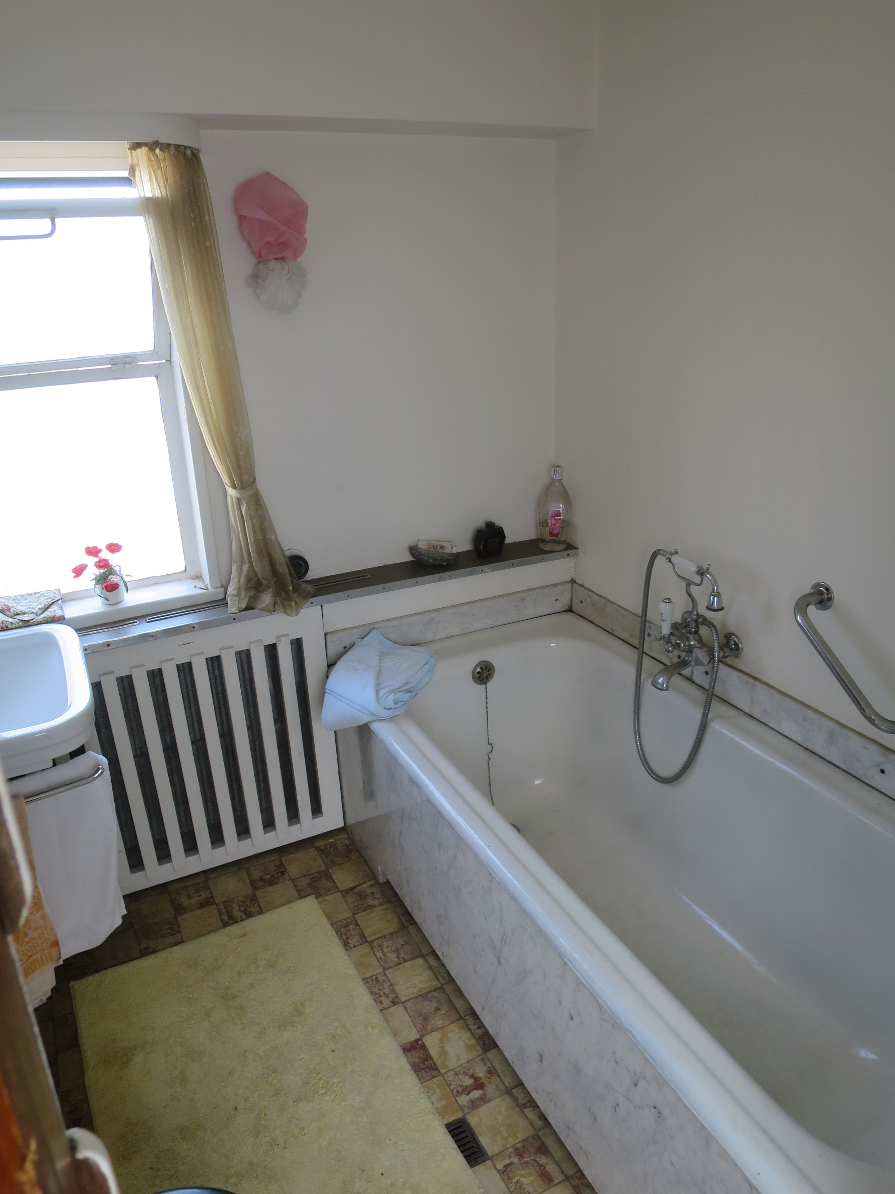 Salonspeisewagen des Sonderzuges von Hermann Göring 10 241 Bln, Badewanne